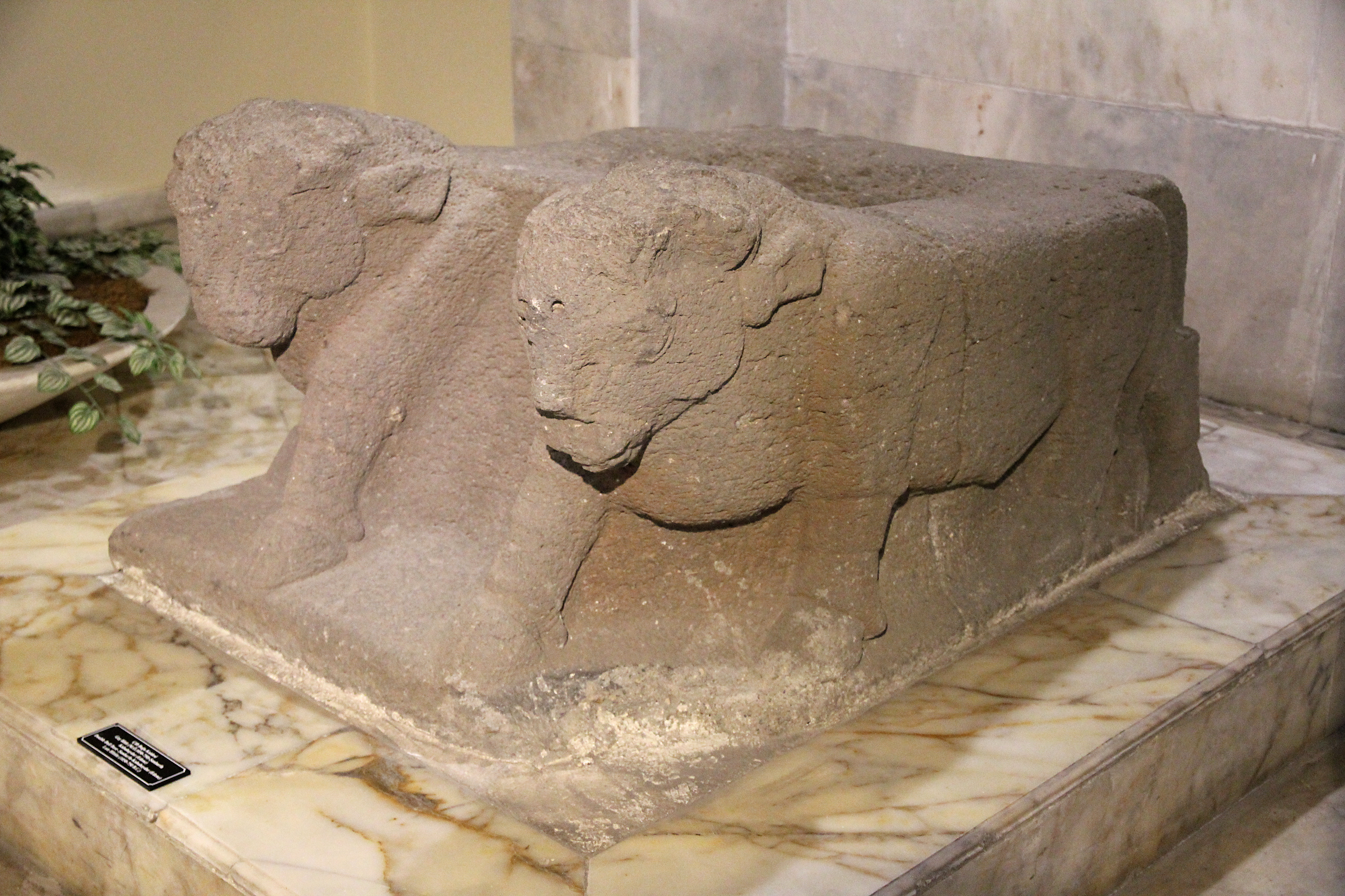 Archäologisches Museum Şanlıurfa, Südosttürkei, Stierbasis aus Kabahaydar